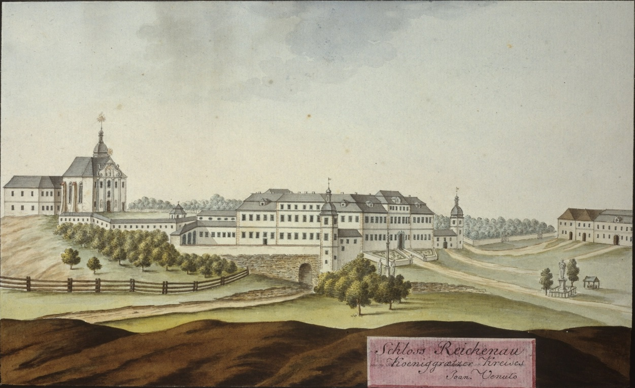 Rychnov nad Kněžnou (zámek). Schloss Reichenau Koeniggraetzer Kreises Joan. Venuto